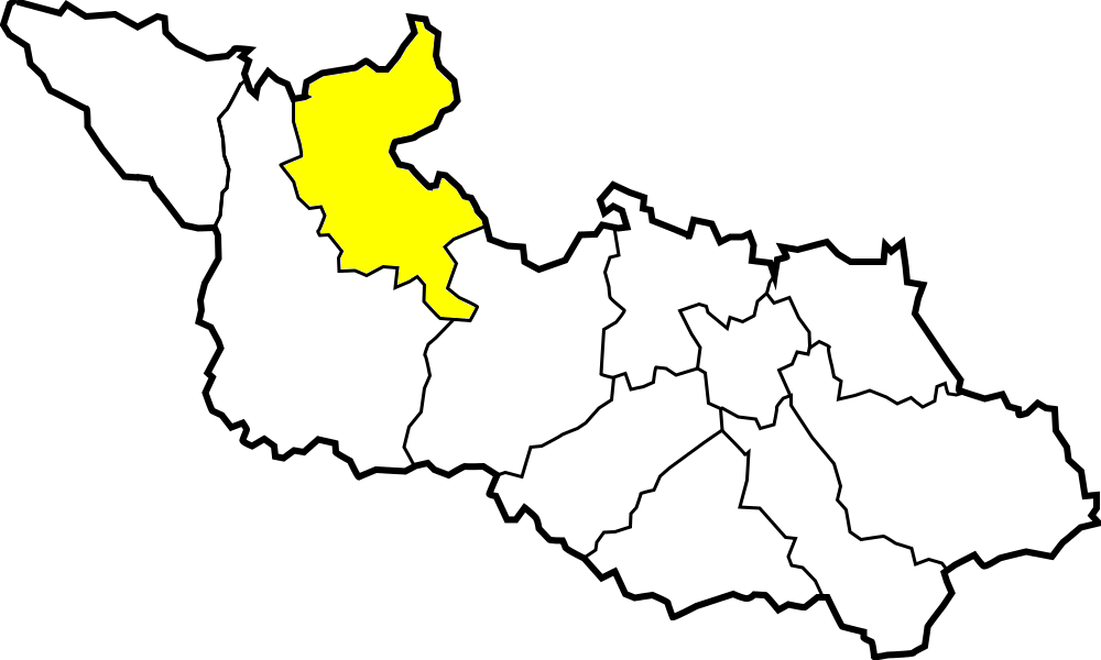 Diecezja ostrawsko-opawska - dekanat Karniów